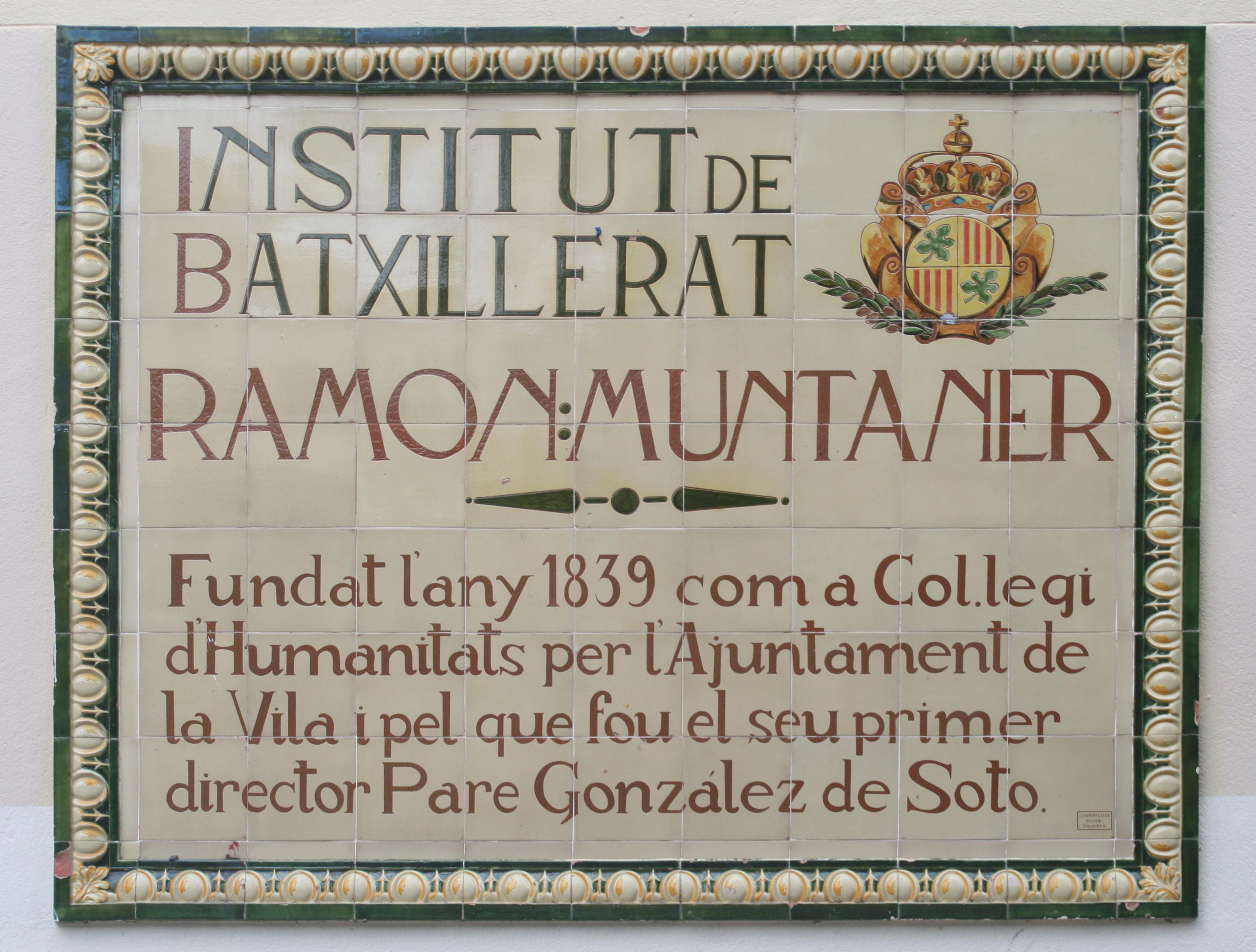 Aquesta placa es troba just al costat de la porta d'entrada de l'institut, i commemora la seva fundació l'any 1839.